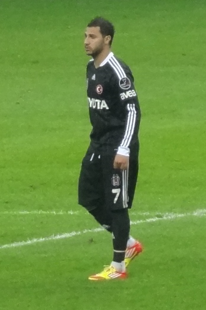 Quaresma Galatasaray derbisinde